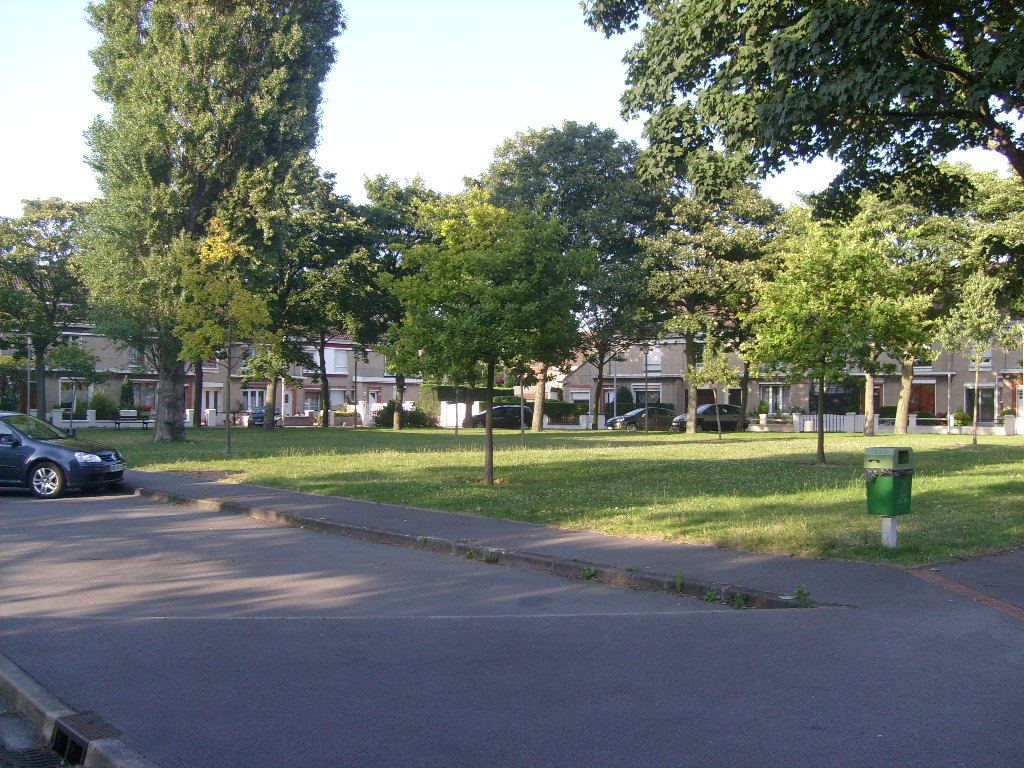 Quartier de la Victoire à Dunkerque